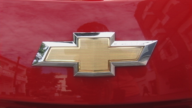 Fotografía del logo de Chevrolet de un automóvil Chevrolet Celta. ARCHIVO ORIGINAL.